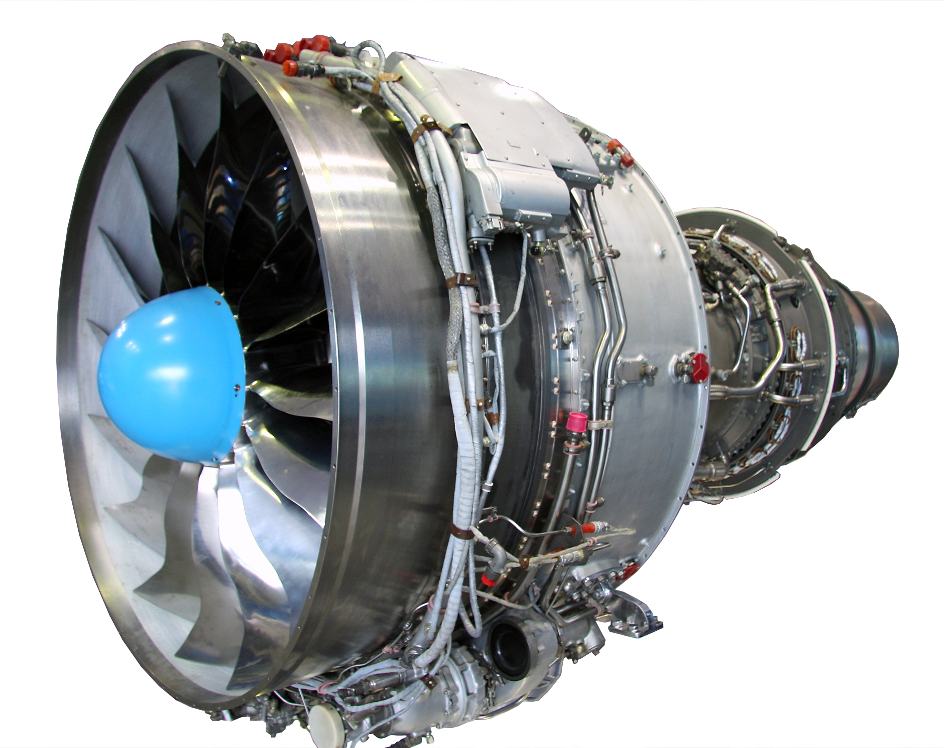 Д-36МВ турбореактивный двигатель для Як-42, АН-72/74